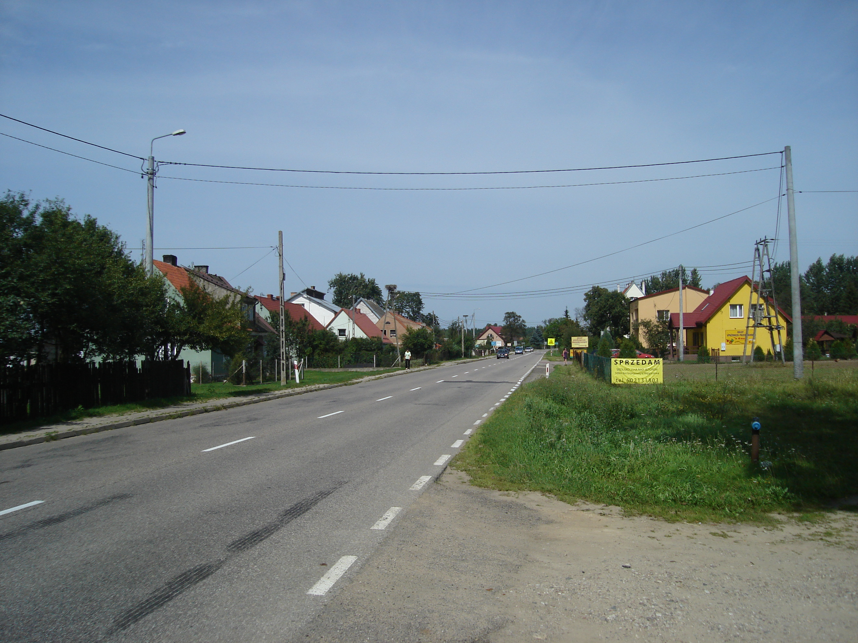 Jeże w powiecie piskim